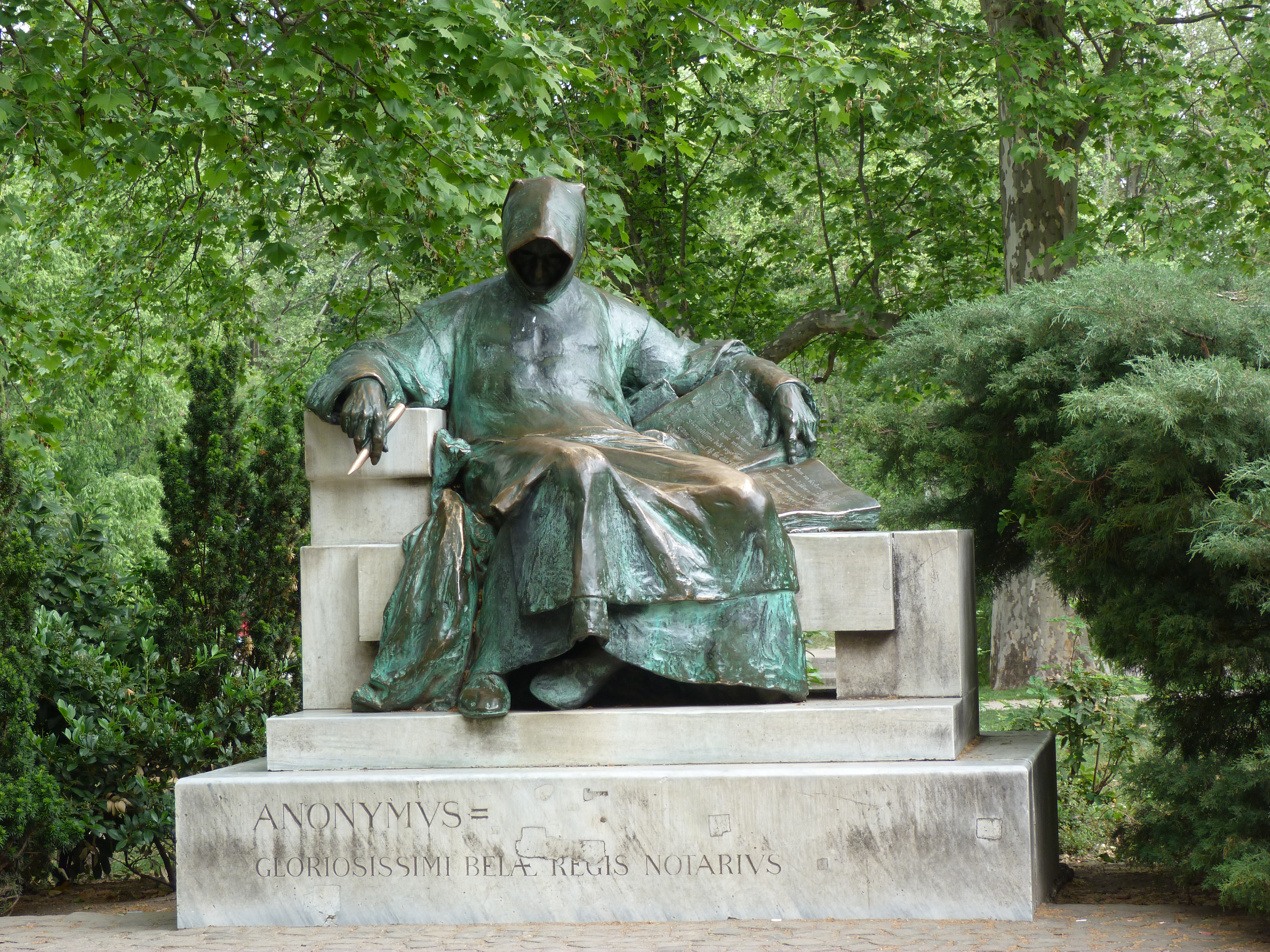 A felvétel 2012. május 19 -én készült Budapesten, a Városligetben. A Mezőgazdasági Múzeummal szemben, Anonymus, Béla király jegyzőjének szobra. ©© Köztulajdon, Derzsi Elekes Andor, Budapest, 2012, . A kép és filmfelvételek egészben, vagy részletekben másolását, bármilyen úton történő sokszorosítását és felhasználását a szerző ellenérték nélkül, jogutódjaira is kihatóan megengedi. Az engedély kiterjed a kereskedelmi célú hasznosításra is. Kéri azonban nevének feltüntetését a felhasználás során. A Metapolisz sorozat valamennyi képe és filmje Creative Commons alatti valamint kereskedelmi - for profit - célra is felhasználható. Ajánlott hivatkozás: Derzsi Elekes Andor: Metapolisz DVD line ©©Public domain, Derzsi Elekes Andor, Budapest, 2013, . You are authorised to use these photos and vids under Creative Commons – even for commercial, for profit purposes. Photos must be attributed to Derzsi Elekes Andor. All of the photos and vids in the Metapolisz DVD line are under Creative Commons and can be used even for commercial – for profit – purposes. Recommended Citation Derzsi Elekes Andor: Metapolisz DVD line